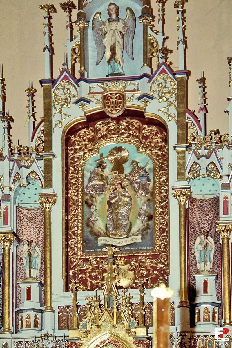 W Ligocie znajduje się świątynia Wniebowzięcia NMP, która powstała w połowie wieku XIX. W ostatnich dniach maja 1945, żołnierze Armii Czerwonej podpalili obiekt. Mieszkańcom wsi udało się odbudować kościół w 1956. W sierpniu 1957 świątynię poświęcono i erygowano parafię. Tego samego dnia nastąpiło również intronizowanie obrazu Patronki kościoła Matki Boskiej Otynieńskiej. Obraz ten wraz z dwoma ołtarzami bocznymi, amboną, chrzcielnicą, stacjami drogi krzyżowej, żyrandolem itp. przybył z Otyni (za Wikipedią). Jako siedmioletni chłopiec byłem na poświęceniu i erygowaniu świątyni i zdarzenie to pamiętam.